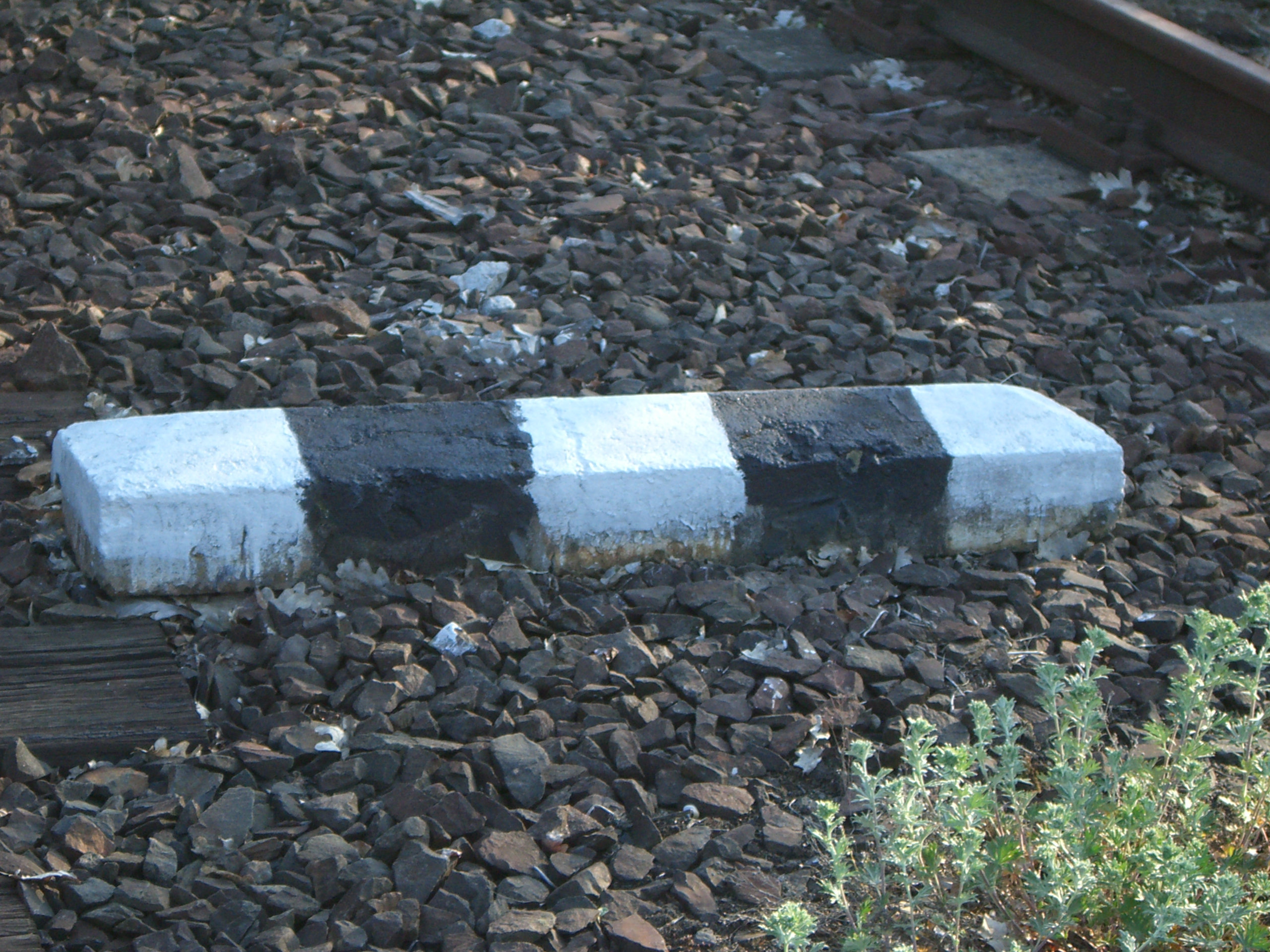 Námezník na nepoužívané trati v Pardubicích.